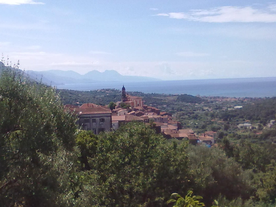 Panorama di Vibonati